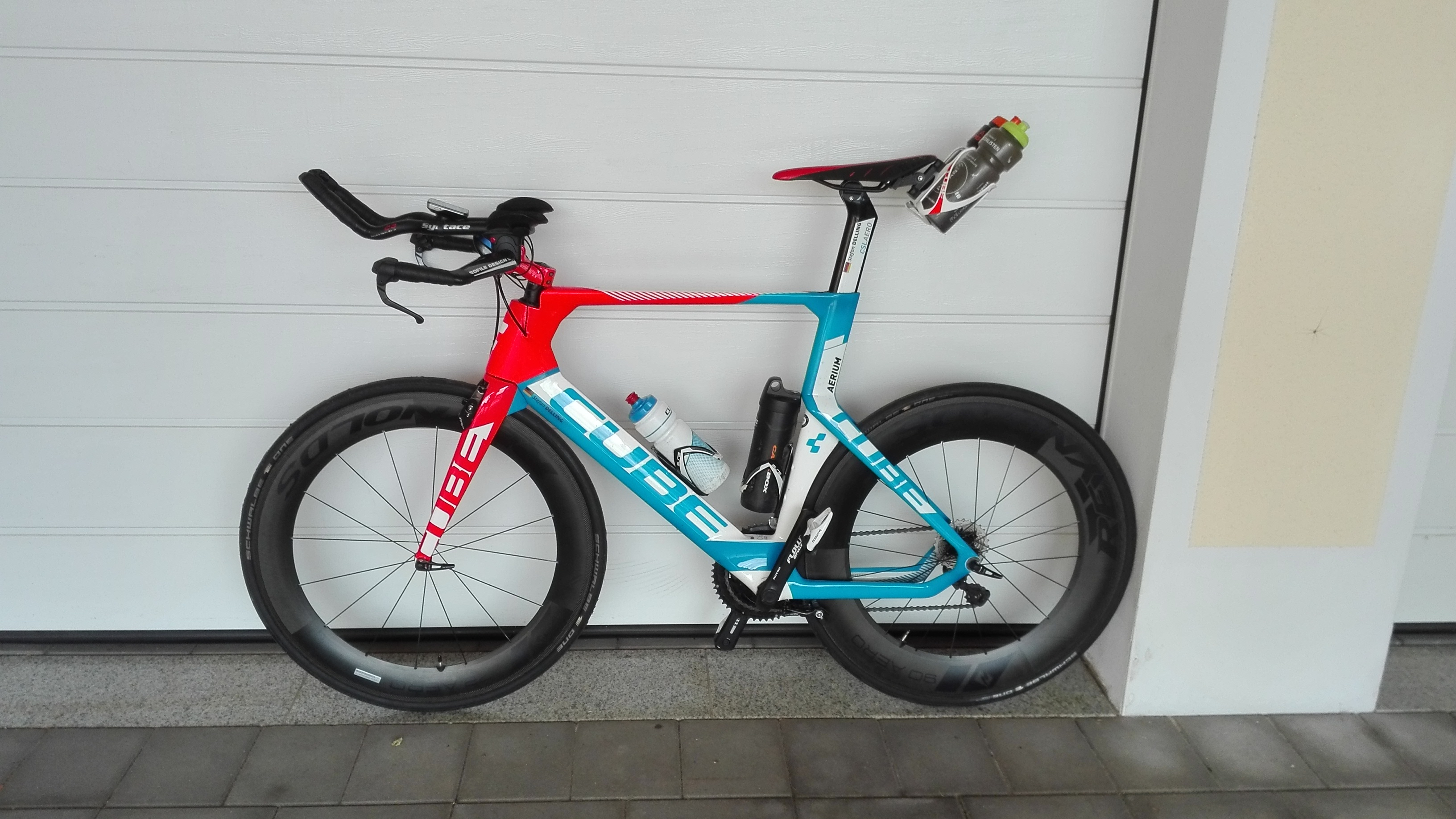 Cube Aerium C62 DI2, Reynolds 72/90 Laufräder